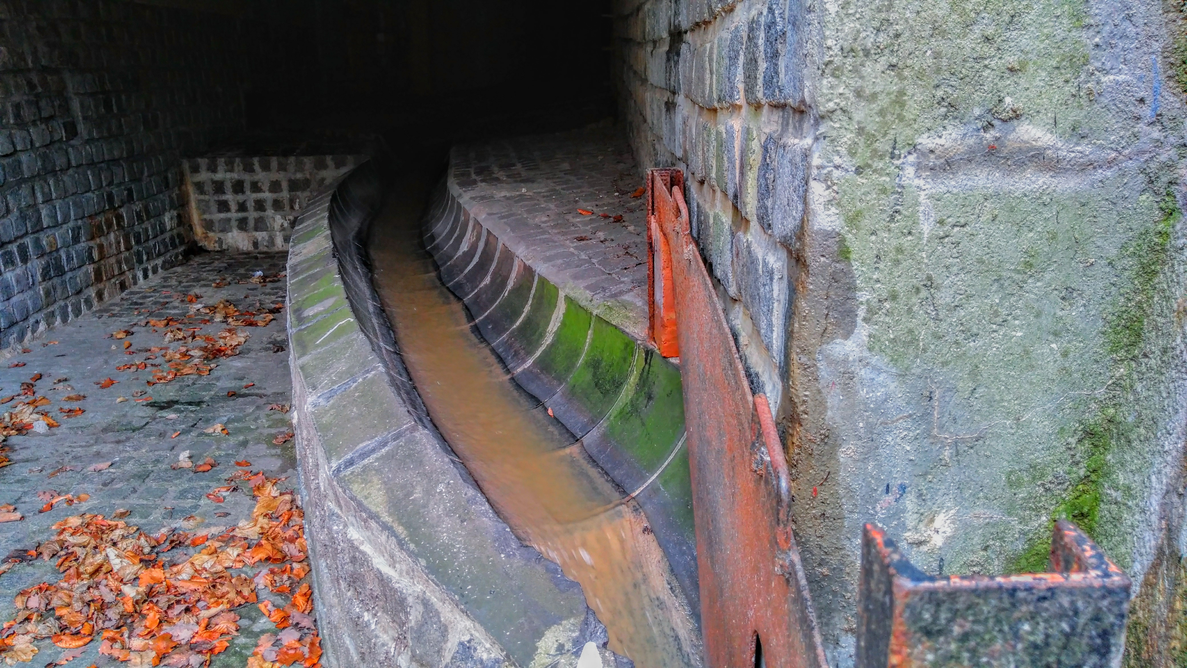 Odlehčení splaškové kanalizace pod zastávkou Šárka v Kohoutovicích, Brno.